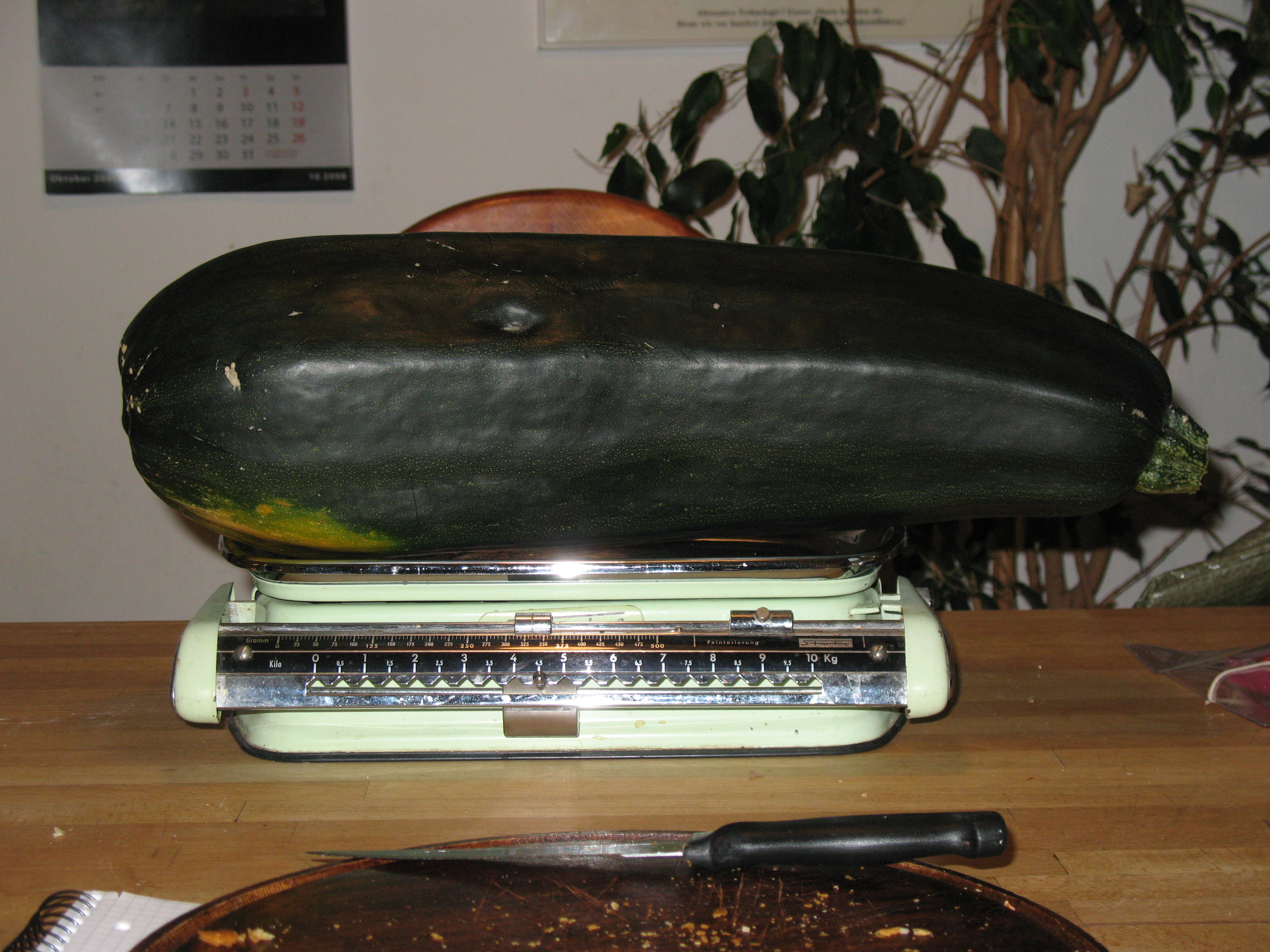 Zucchini ausgereift, 4,850 gr., Herbst 2008